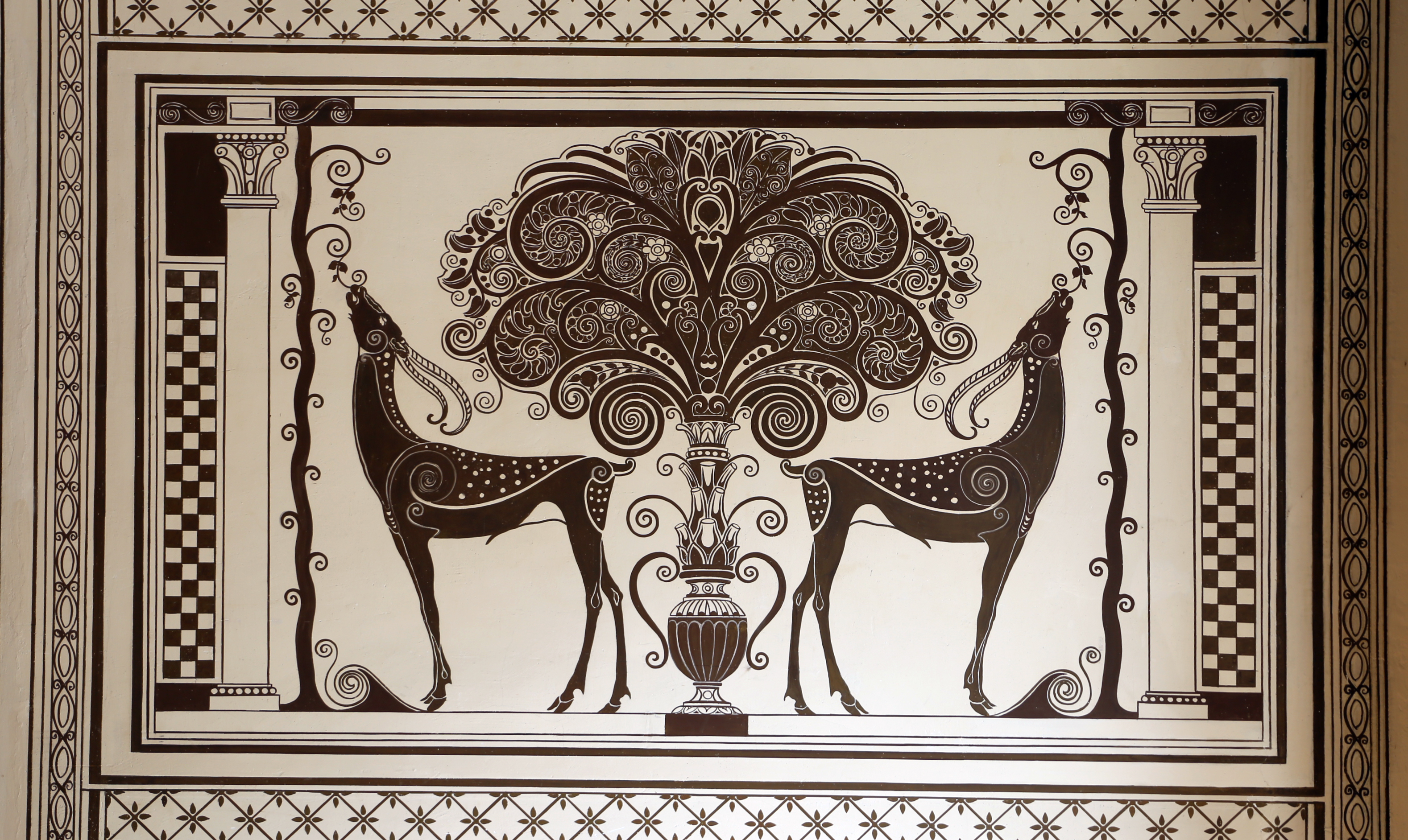 Palazzo dei Congressi (Salsomaggiore Terme) This is a photo of a monument which is part of cultural heritage of Italy.